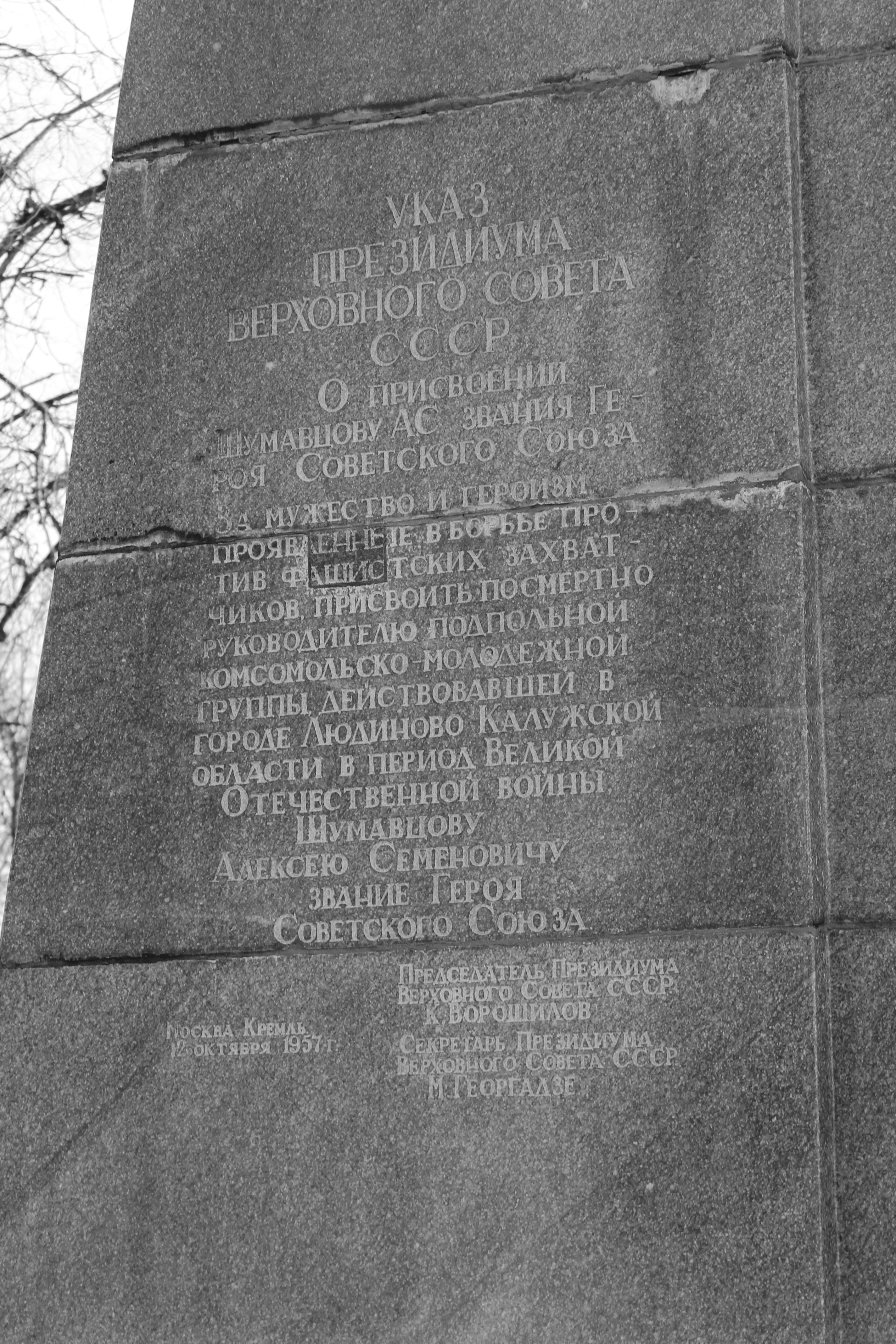 Памятник комсомольцам Людиновской комсомольской подпольной организации, погибшим в борьбе с немецко-фашистскими захватчиками в годы ВОВ (Калужская область, Людиново, Сквер, у центральной площади города)